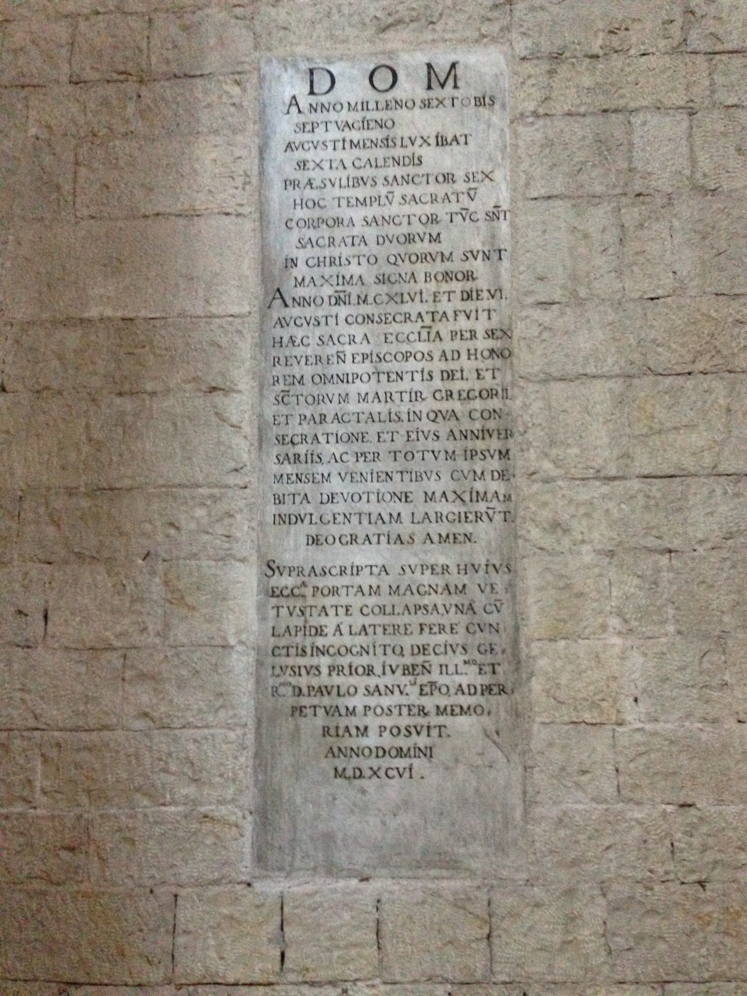 Spoleto. chiesa San Gregorio Maggiore. Scritta marmorea